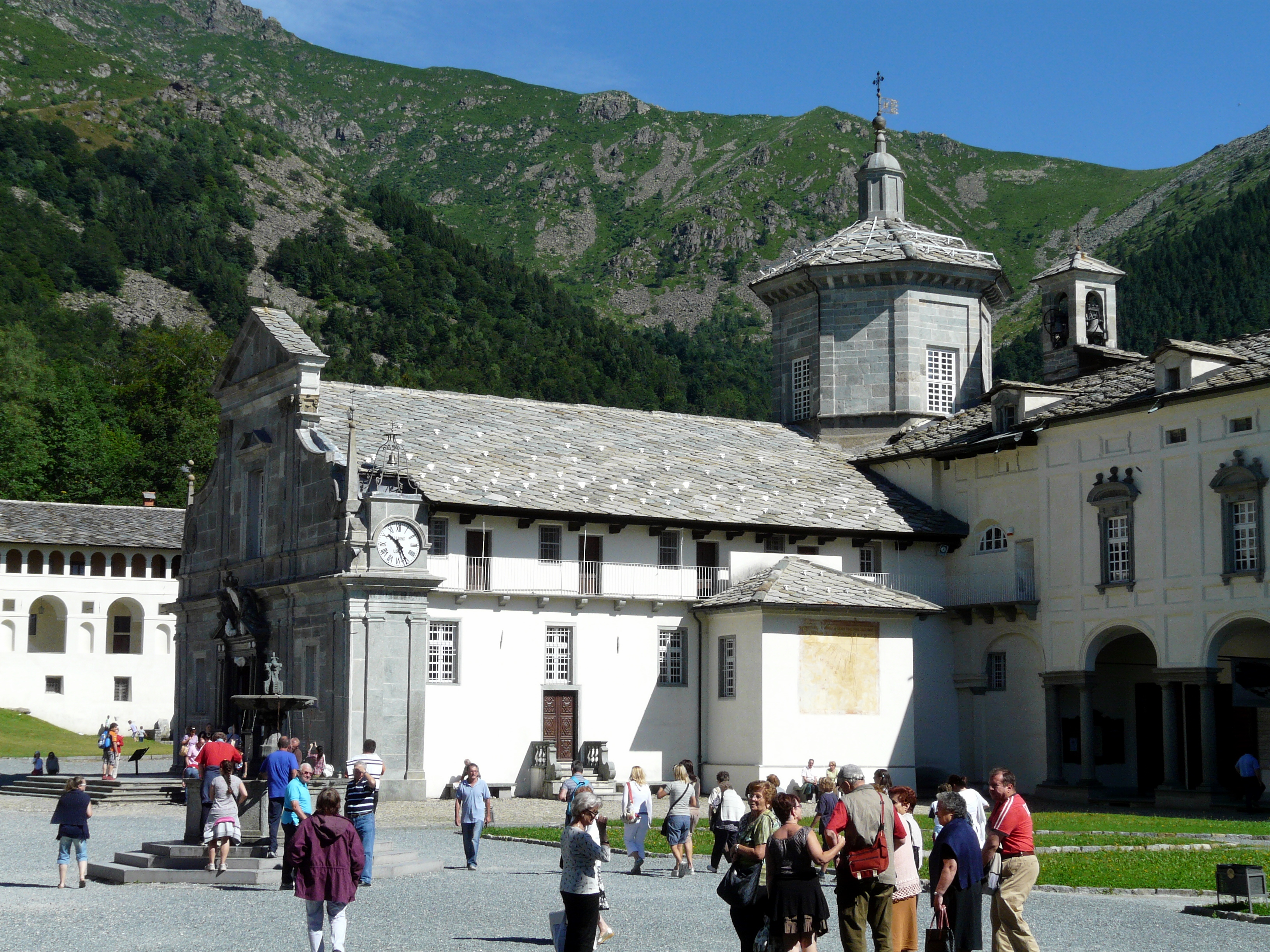 Serie di immagini del Santuario di Oropa, Piemonte, Italia